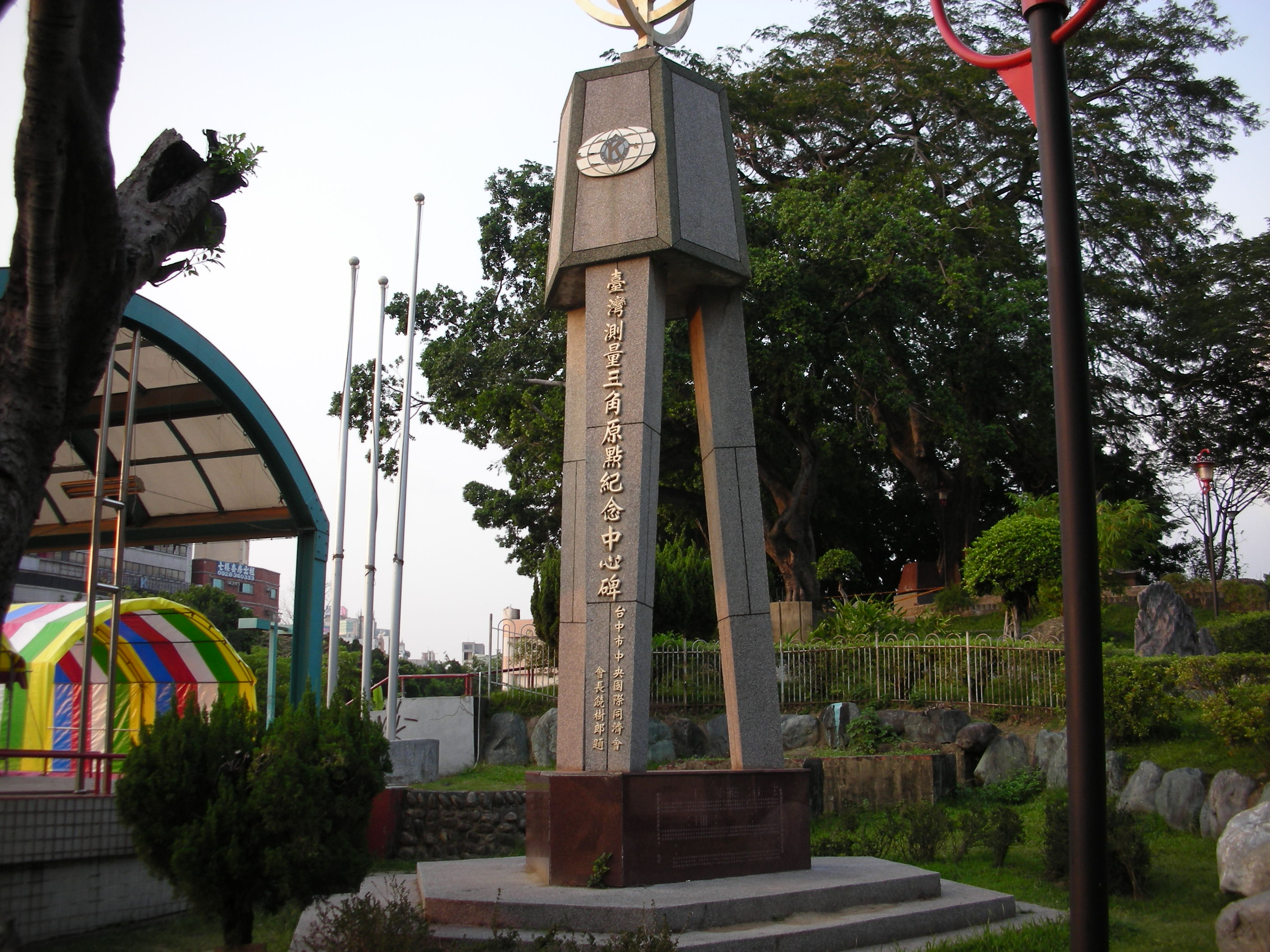 台灣測量三角原點紀念中心碑